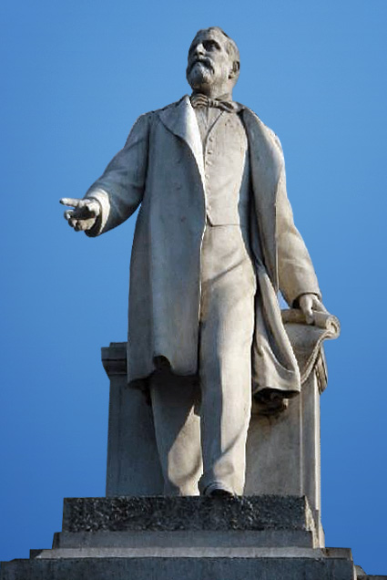 Reggio Calabria:Statua, parte del monumento a Giuseppe De Nava